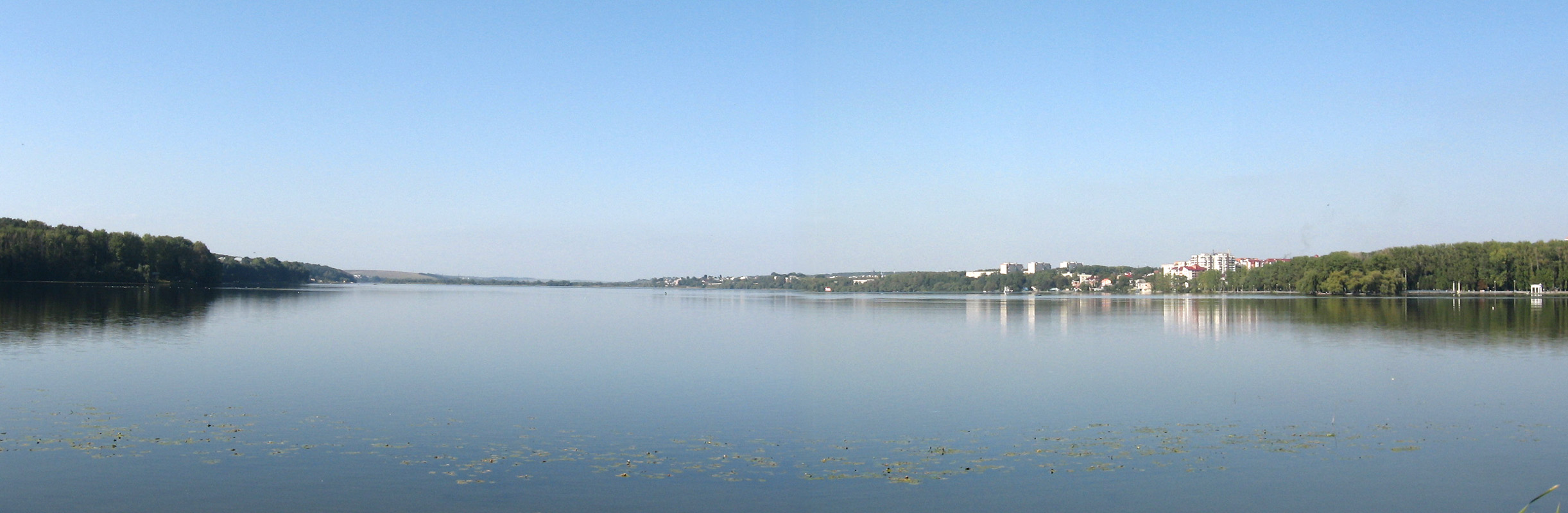 Панорама Тернопольского озера